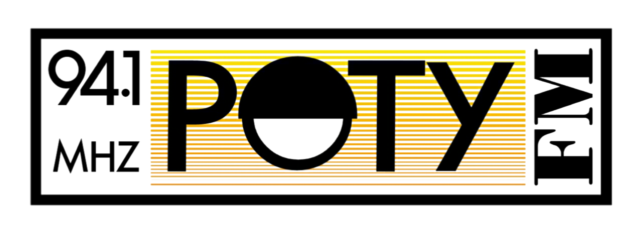 Primeiro logotipo da Rádio Poty FM 94.1, atual Boa FM, emissora de rádio brasileira sediada em Teresina - PI, quando de sua estreia em 1985.